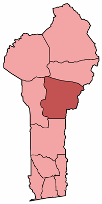 Mappa della diocesi di Parakou, nel Bénin. Lavoro personale, eseguito a partire da questa immagine di Commons. Fonte per i confini delle diocesi: Guida delle missioni cattoliche 2005, a cura della Congregatio pro gentium evangelizatione, Roma, Urbaniana University Press, 2005. Categoria:Chiesa cattolica in Benin